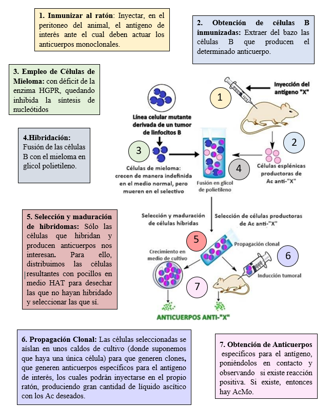 Método de Producción de los Anticuerpos Monoclonales mediante el uso de un animal murino.